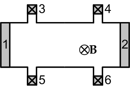 Схема измерения эффекта Холла